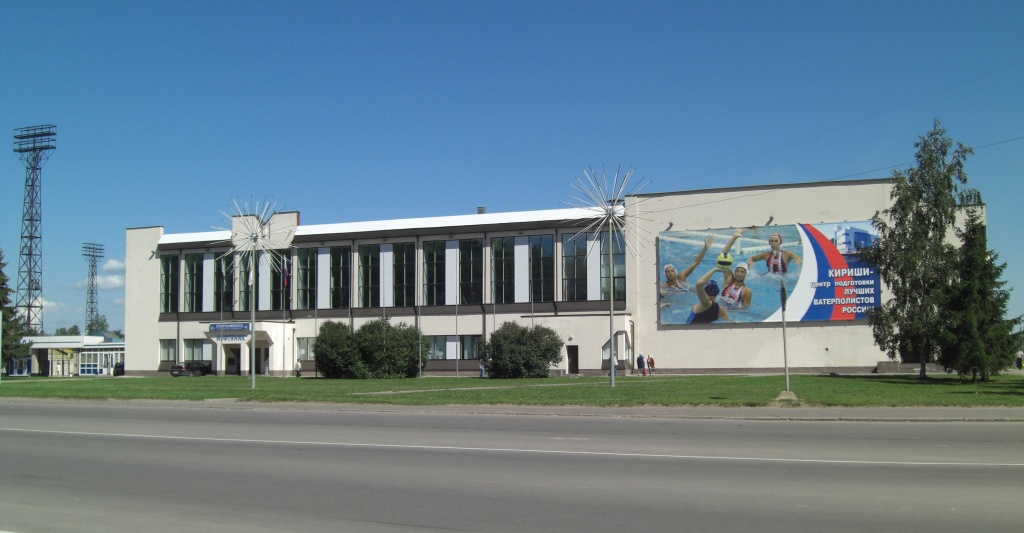 Дворец спорта "Нефтяник" в Киришах (Ленинградская область России)